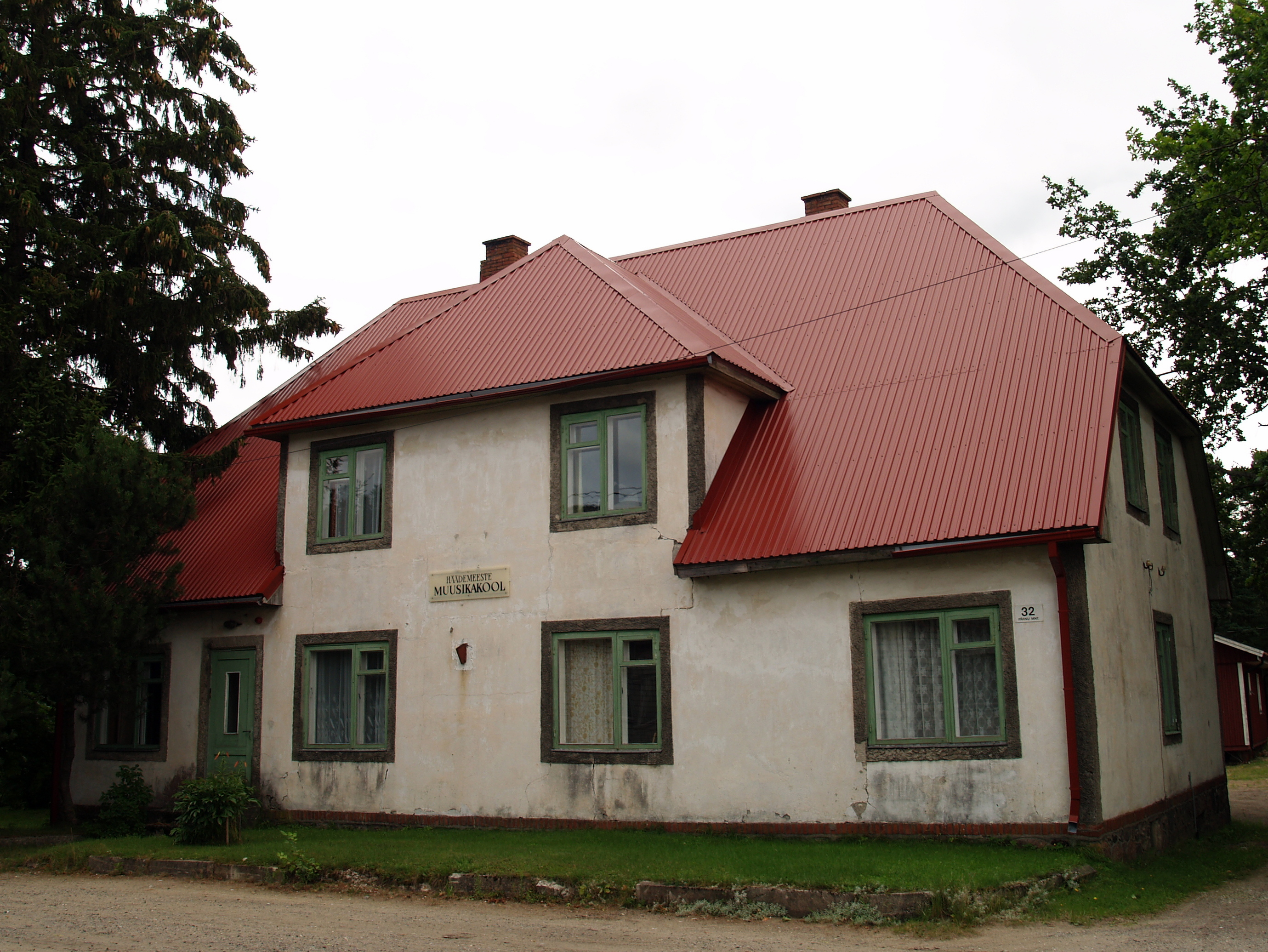 Häädemeeste muusikakool